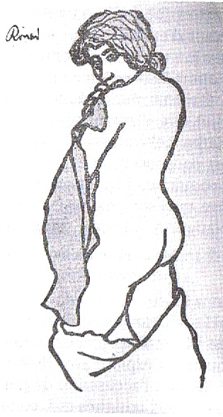 dessin de Josef Rippl-Ronaï (1861-1927), représentant Célestine, l'héroïne de Journal d'une femme de chambre, d'Octave Mirbeau (1848-1917)